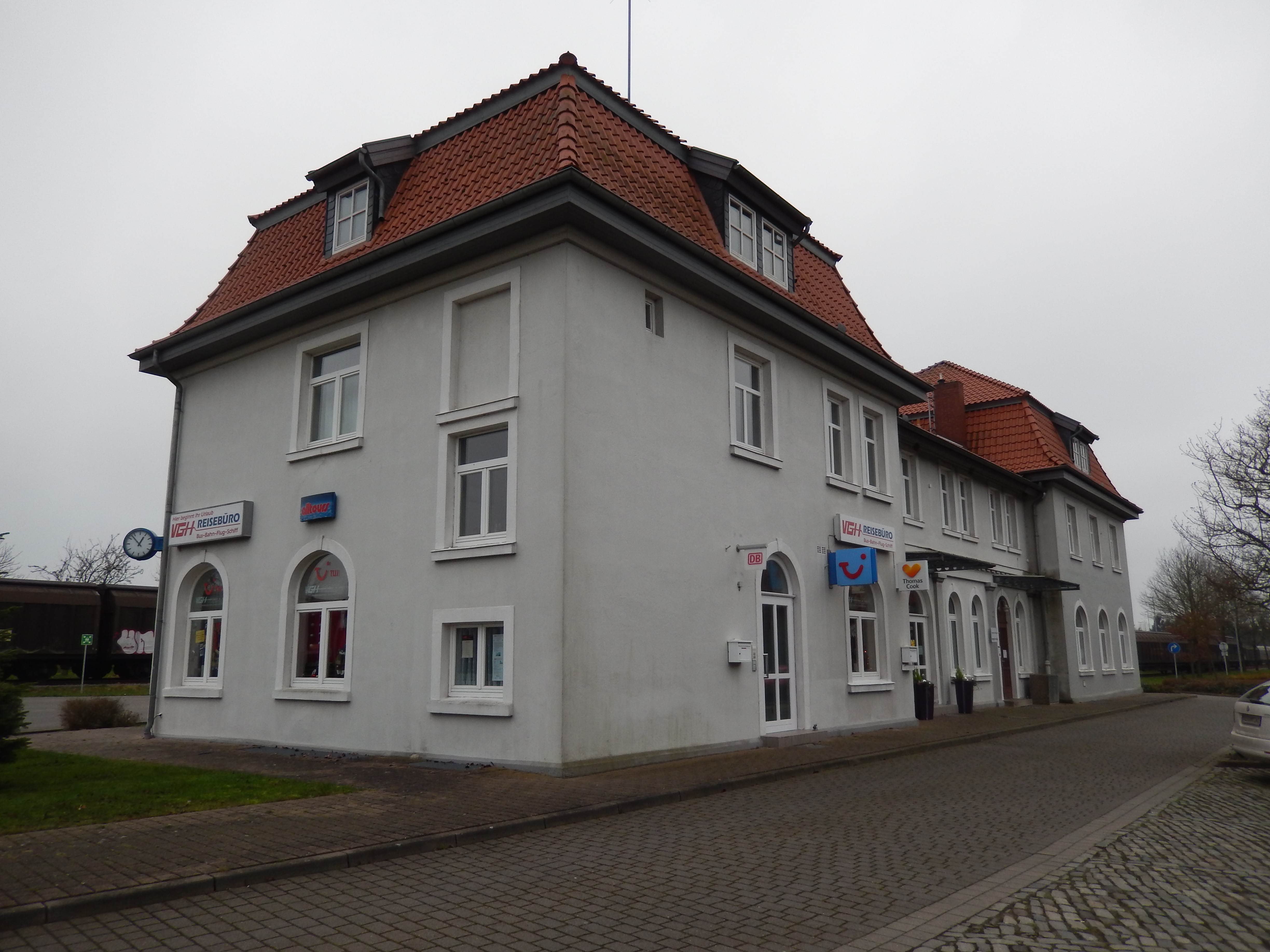 Bahnhof Hoya, Sitz der VGH